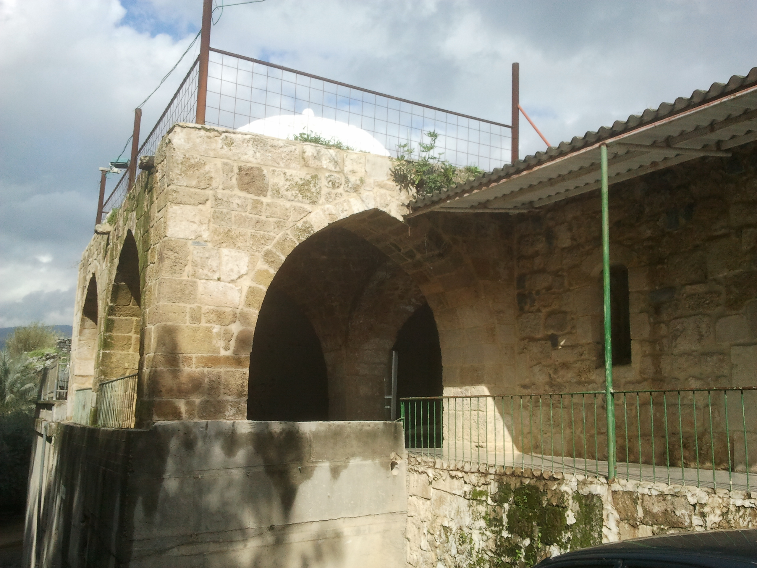 קבר נבי יהודה, או נבי הודה, הוא מבנה המזוהה על ידי העדה הדרוזית עם מקום קבורתו של יהודה בן יעקב. המבנה נמצא בעמק החולה ליד היישוב שאר ישוב מבנה הקבר מבחוץ